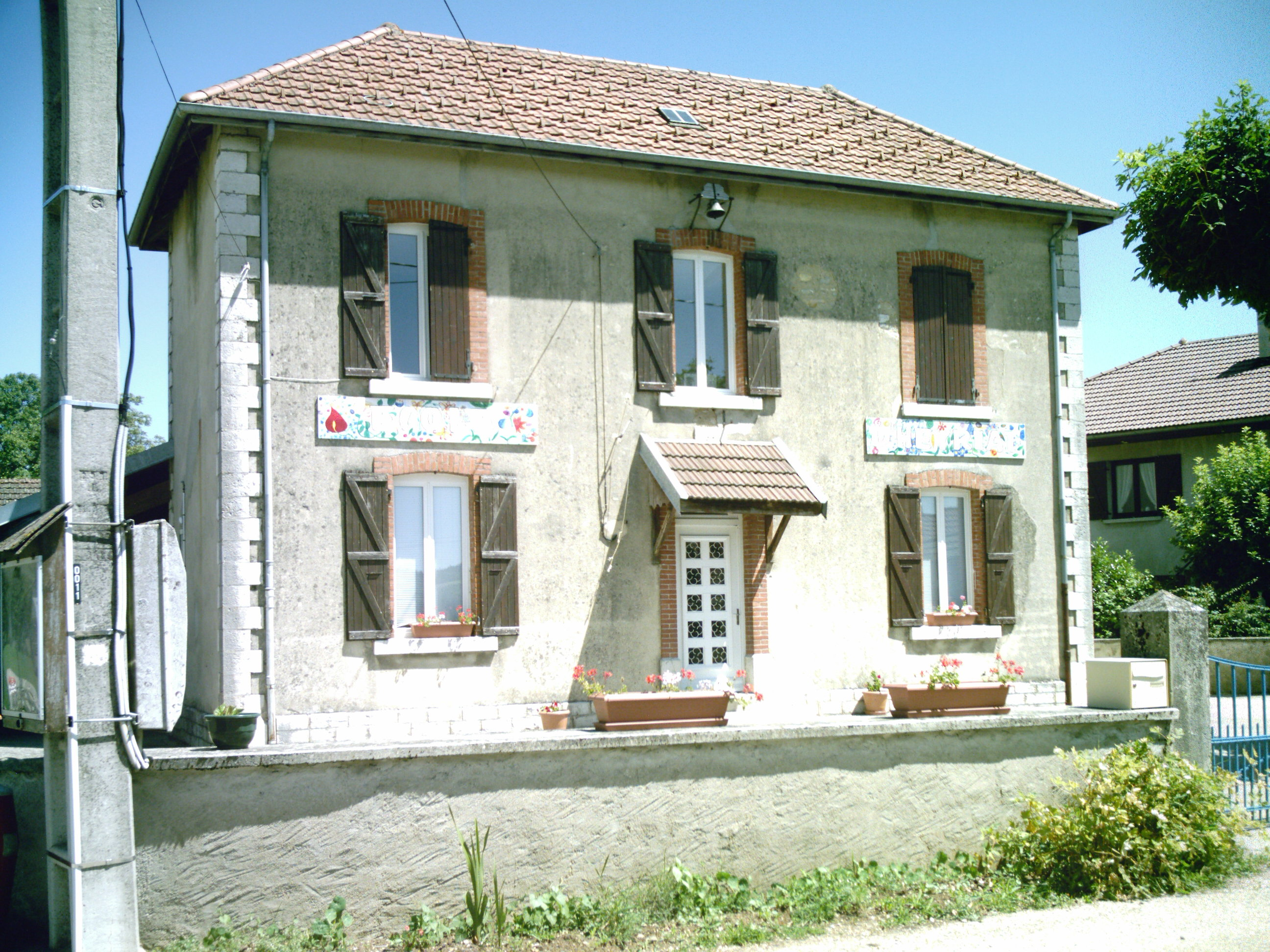 L'école d'Heyriat (Sonthonnax-la-Montagne)